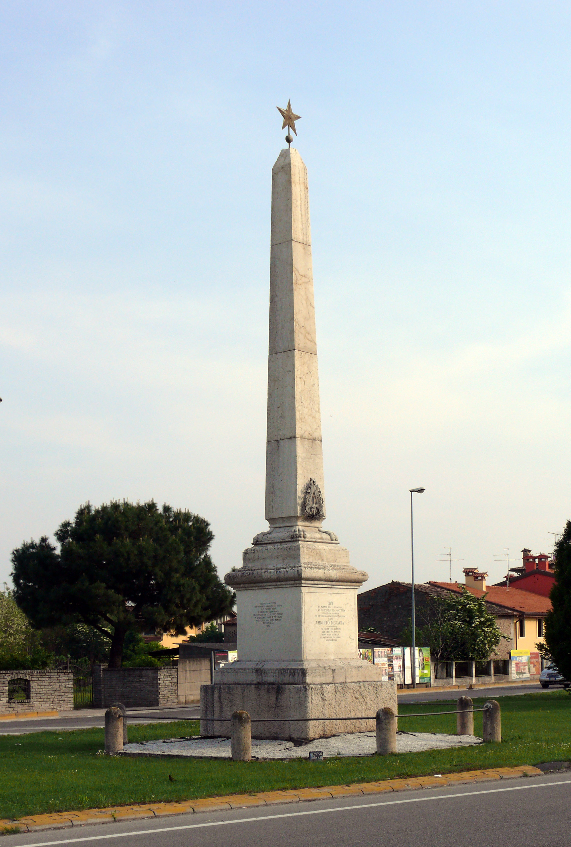 monumento obelisco in memoria del fatto d'arme del 24 giugno 1866 noto come " IL QUADRATO DI VILLAFRANCA"